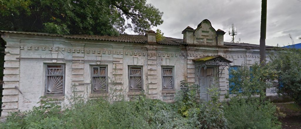 больница на Больничной 10